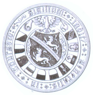 Siegel des eidgenössischen Landgerichts mit den Wappen der zehn das Landgericht besitzenden eidgenössischen Orte. Undatiert, nach 1499. Umschrift: Sigillum iudicii generalis in Thurgow (Siegel des Hochgerichts im Thurgau).